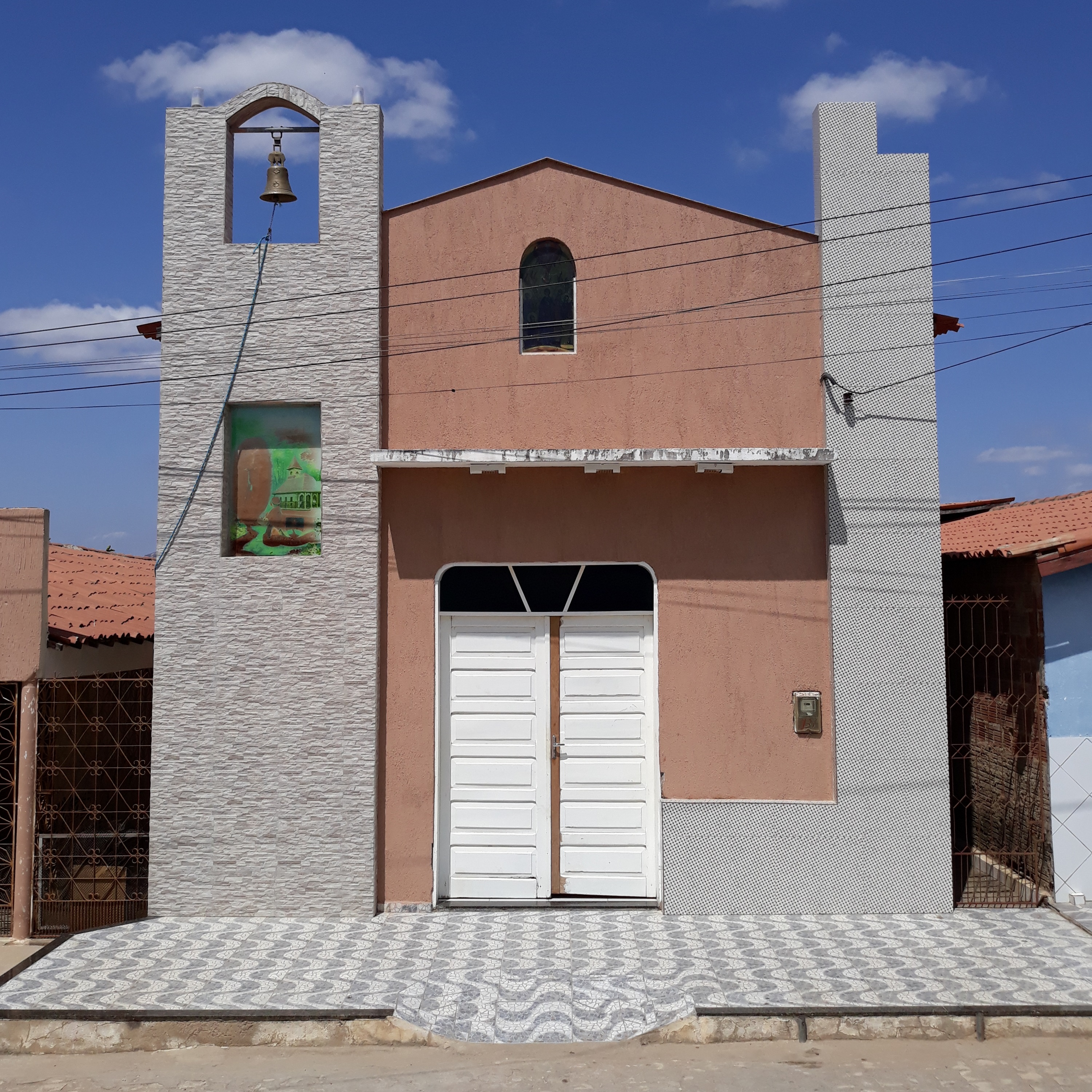 Capela de Nossa Senhora da Virgem dos Pobres, da paróquia de Nossa Senhora da Conceição, no bairro Paraíso, em Pau dos Ferros, no Rio Grande do Norte (Brasil)